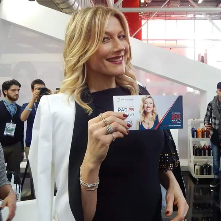 Natasha Stefanenko@Cosmoprof 2016